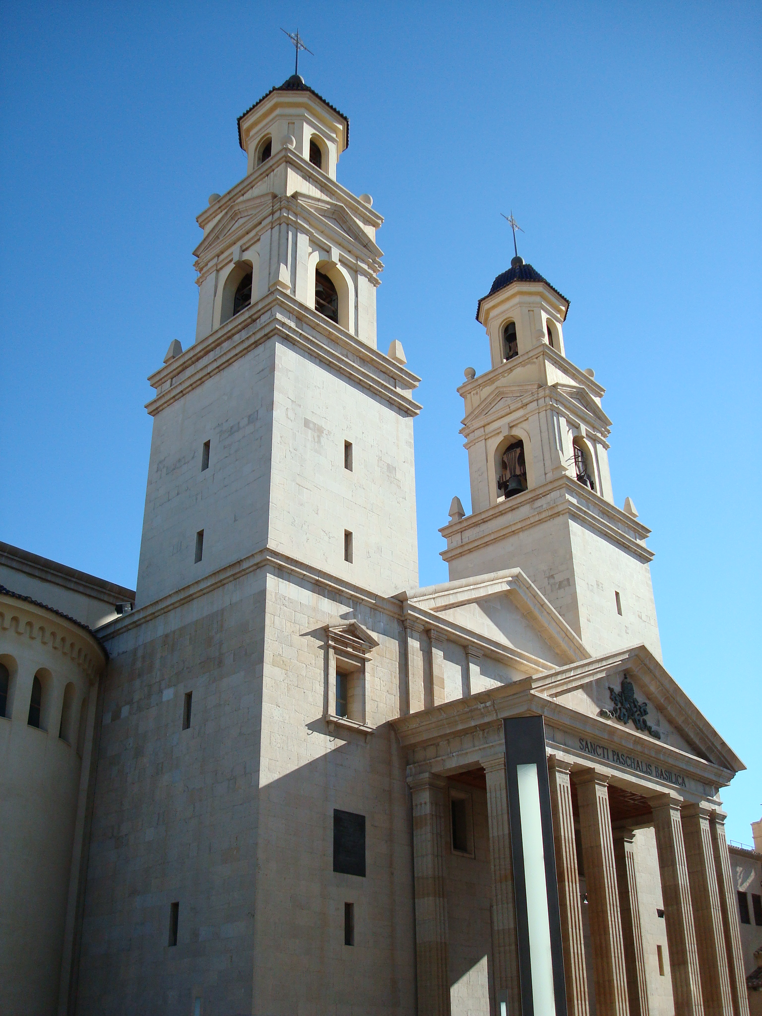 Basilica